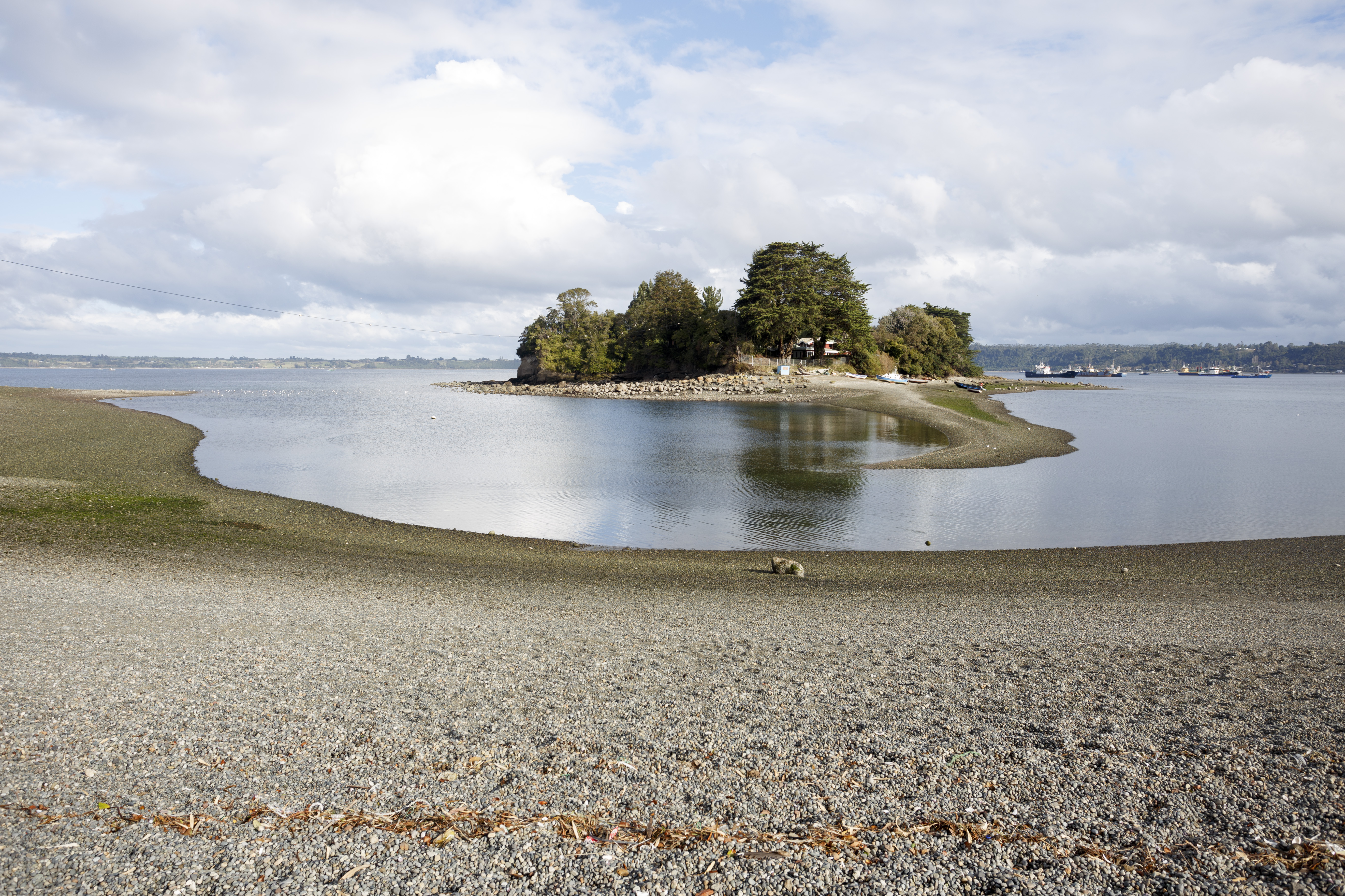 Isla Chinquío, Puerto Montt, Chile.